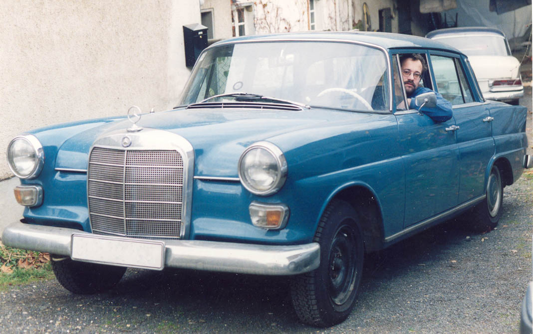 Heckflosse Mercedes-Benz W110